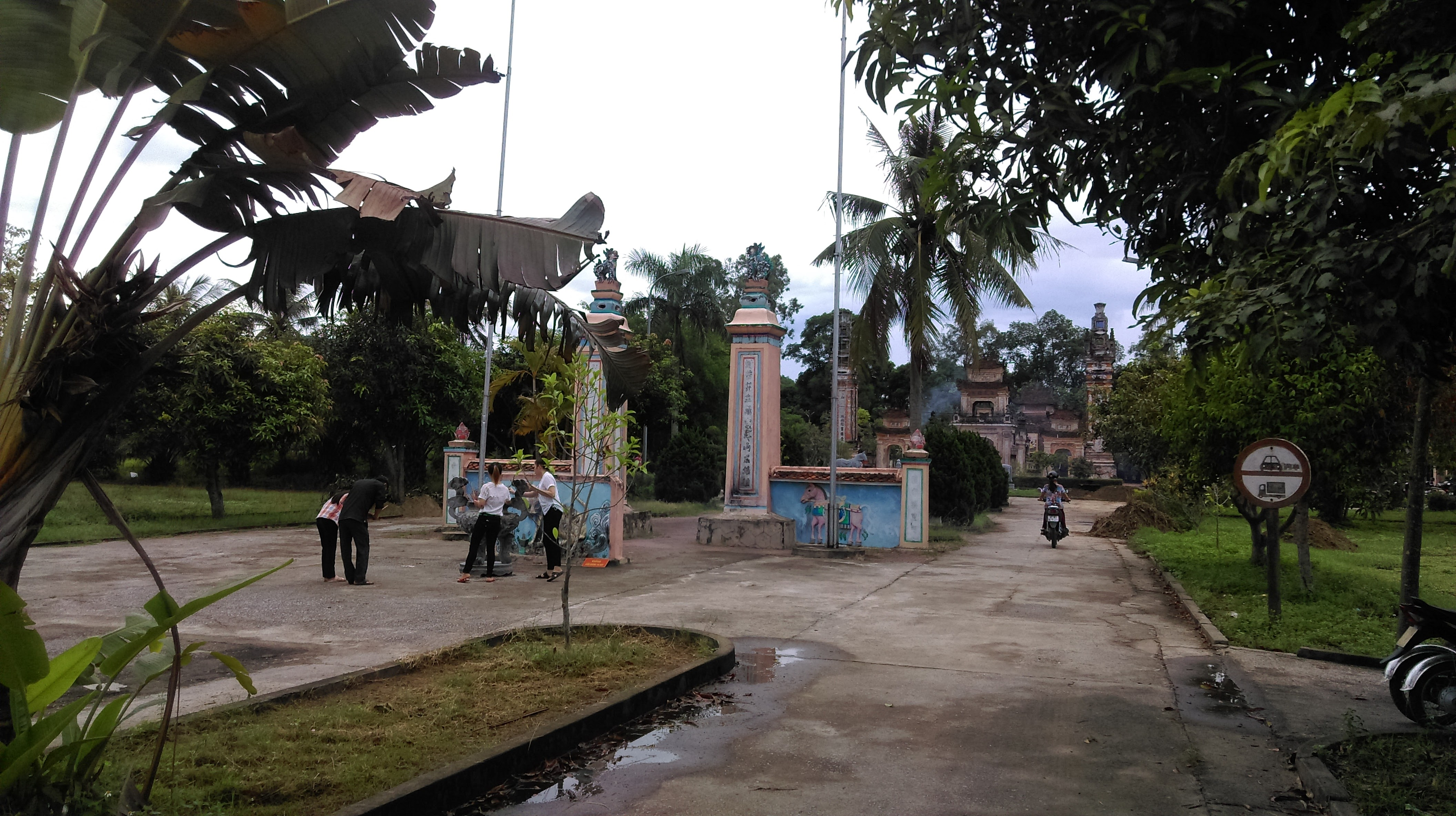 Đền thờ Nguyễn Xí, Nghi Hợp, Nghi Lộc, Nghệ An 2